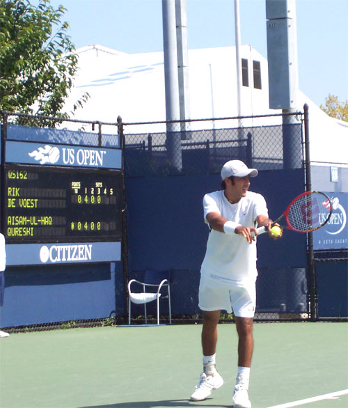 self made